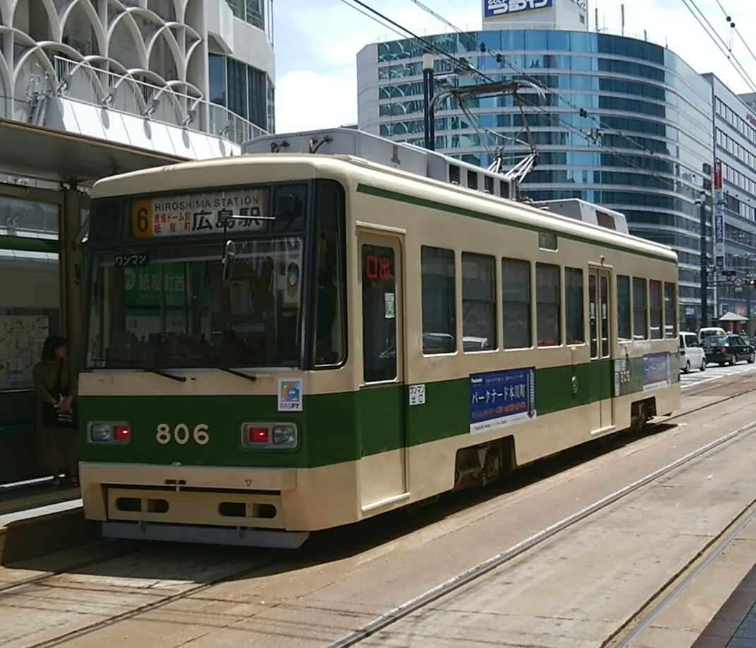 紙屋町西に停車中の806号車